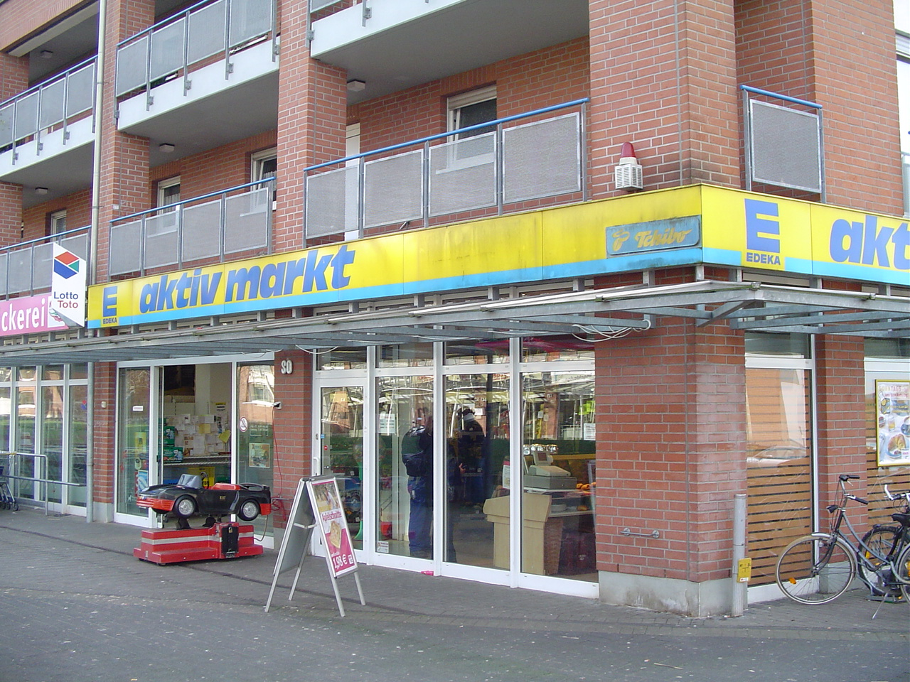 Edeka AktivMarkt, Köln-Blumenberg